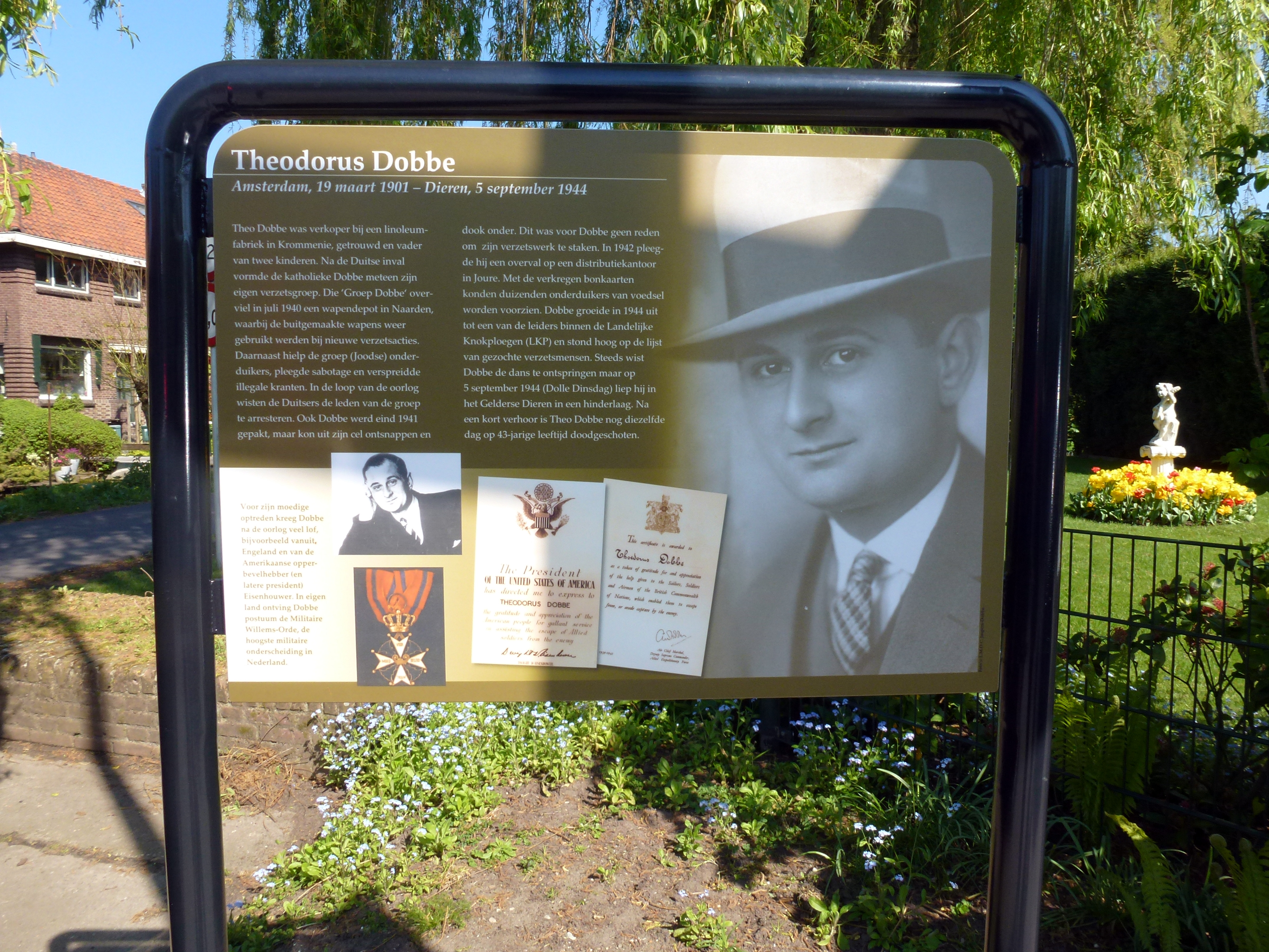 Verzetsheld Theodorus Dobbe. Op 10 april 2014 zijn in Oosterwei 10 van in totaal 16 borden met informatie over verzetsstrijders onthuld. In Oosterwei, een wijk in Gouda, zijn na de 2e wereldoorlog, de wederopbouw, 16 straten vernoemd naar verzetsstrijders. Veel bewoners van deze straten wisten maar weinig over de verzetshelden waarnaar de straten vernoemd zijn. Zij en anderen hebben er voor gezorgd dat nu in iedere straat een informatiebord staat, zodat de gedachtenis aan deze strijders levend blijft. (De overige 6 borden zijn in april 2018 geplaatst)